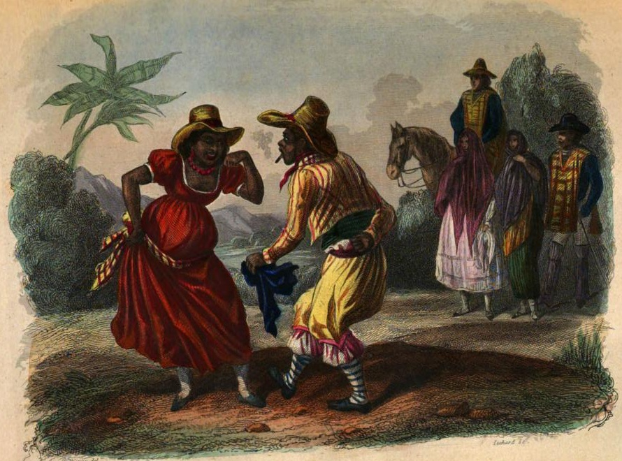 Le Chocolate. Dance indigena a Lima